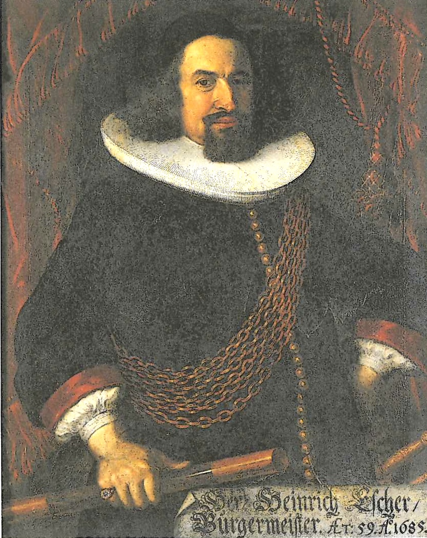 Zürich : Bürgermeister Heinrich Escher (* 26. Juli 1626 in Zürich; † 20. April 1710 ebenda). Bild im Eigentum des Kantons ZH